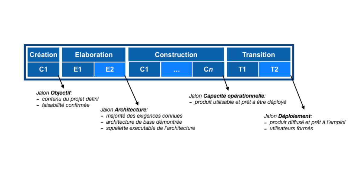 Processus unifiée avec les phases et itérations du développement de logiciels avec les principaux jalons